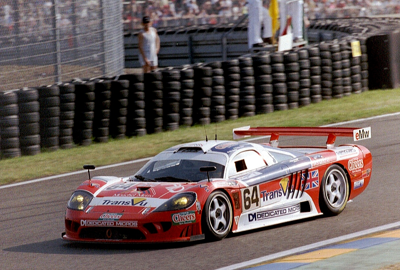 Saleen S7-R, driven by Thomas Erdos, Pedro Chaves & Mike Newton from Graham Nash Motorsport approaches Dunlop Bridge at the 2003 24 Hours of Le Mans